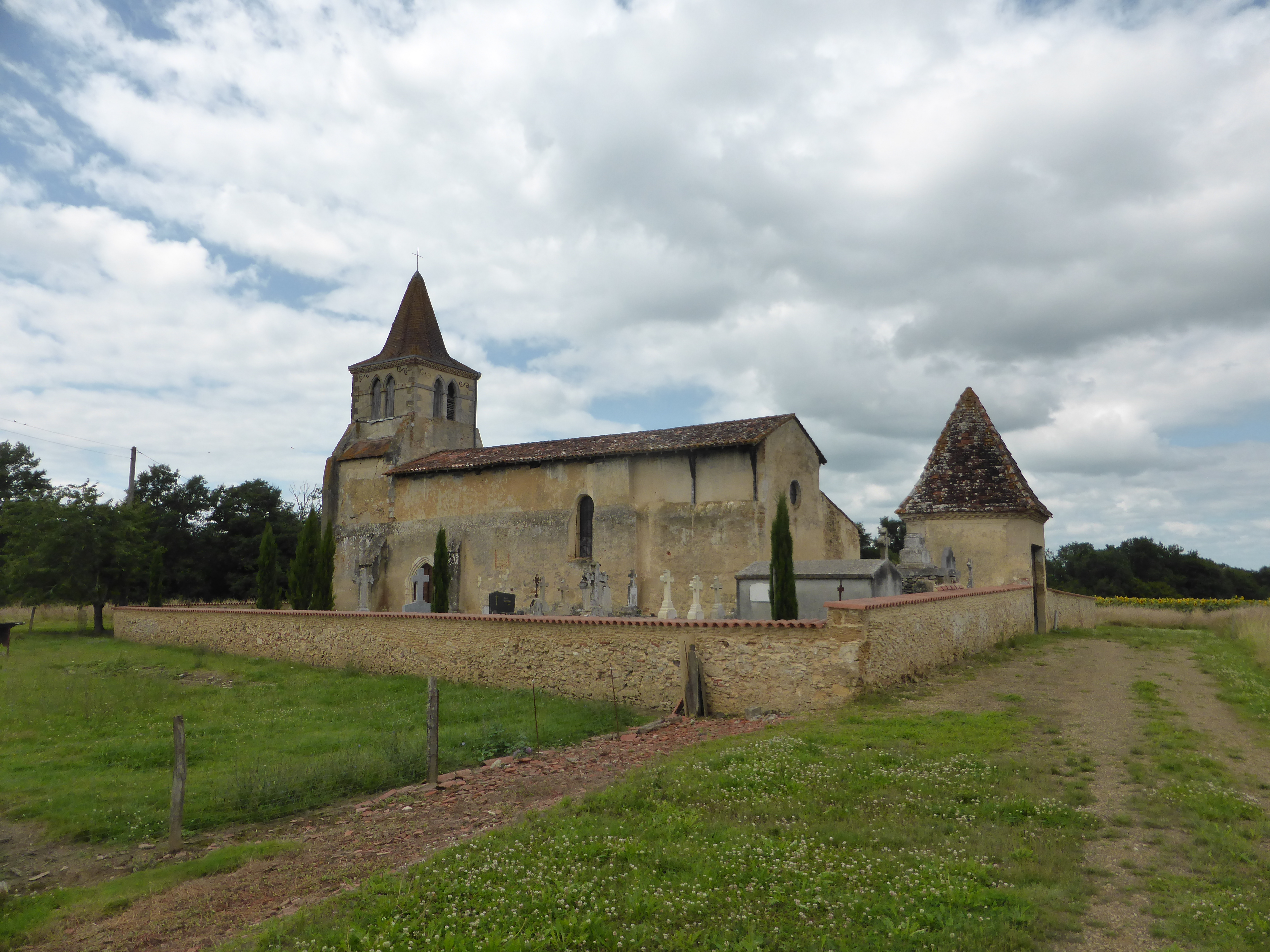 Église de Cucassé, à Mauléon-d'Armagnac, dans le Gers.